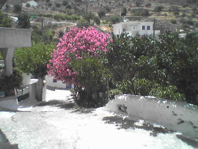 petrouni sykologou